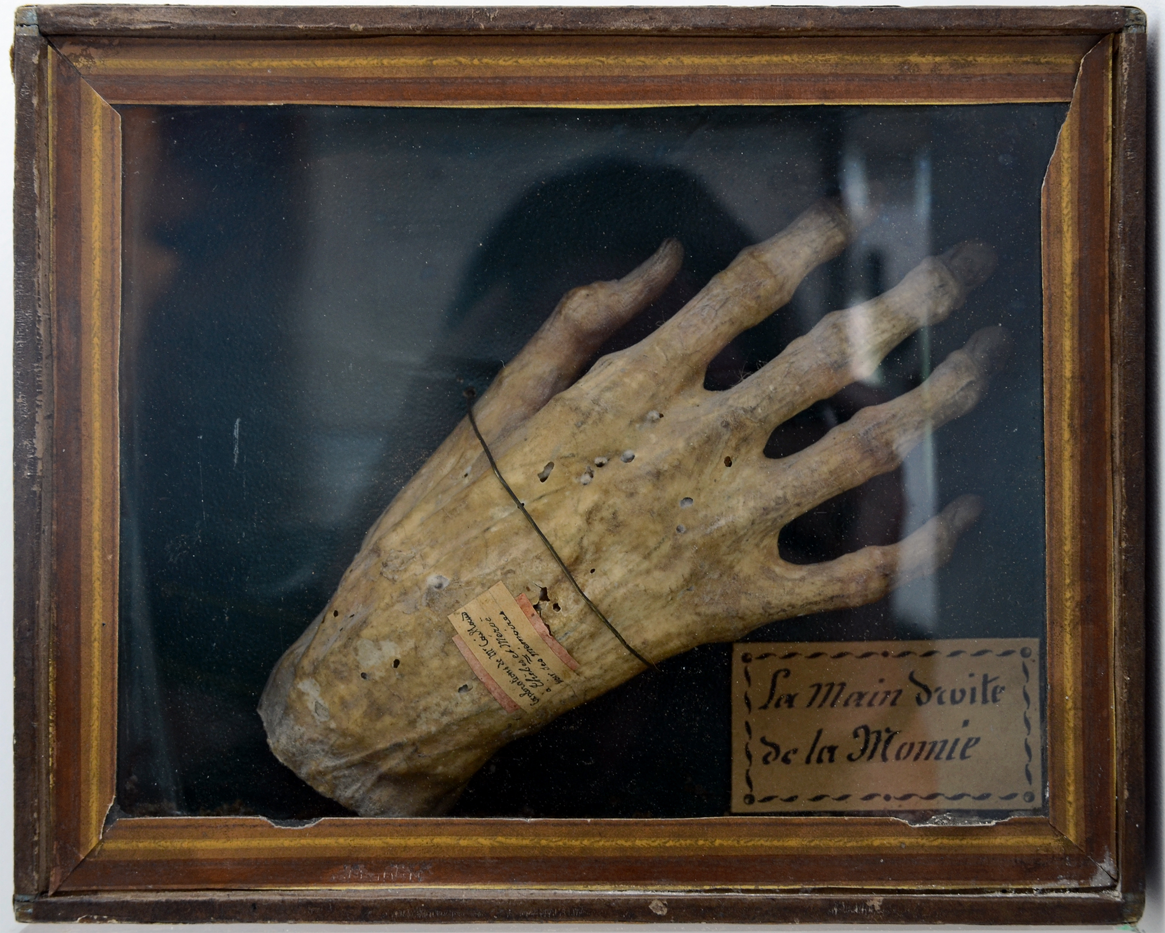 Main de momie égyptienne, rapportée par Frédéric Cailliaud (1787-1869), égyptologue et naturaliste, d'une des deux expéditions auxquelles il a participé (1815 et 1822), dans le cadre de la Campagne d'Egypte.